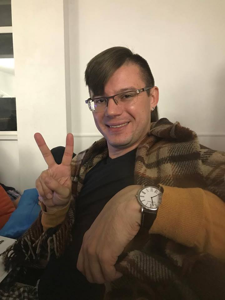 Яковлєв Максим Володимирович